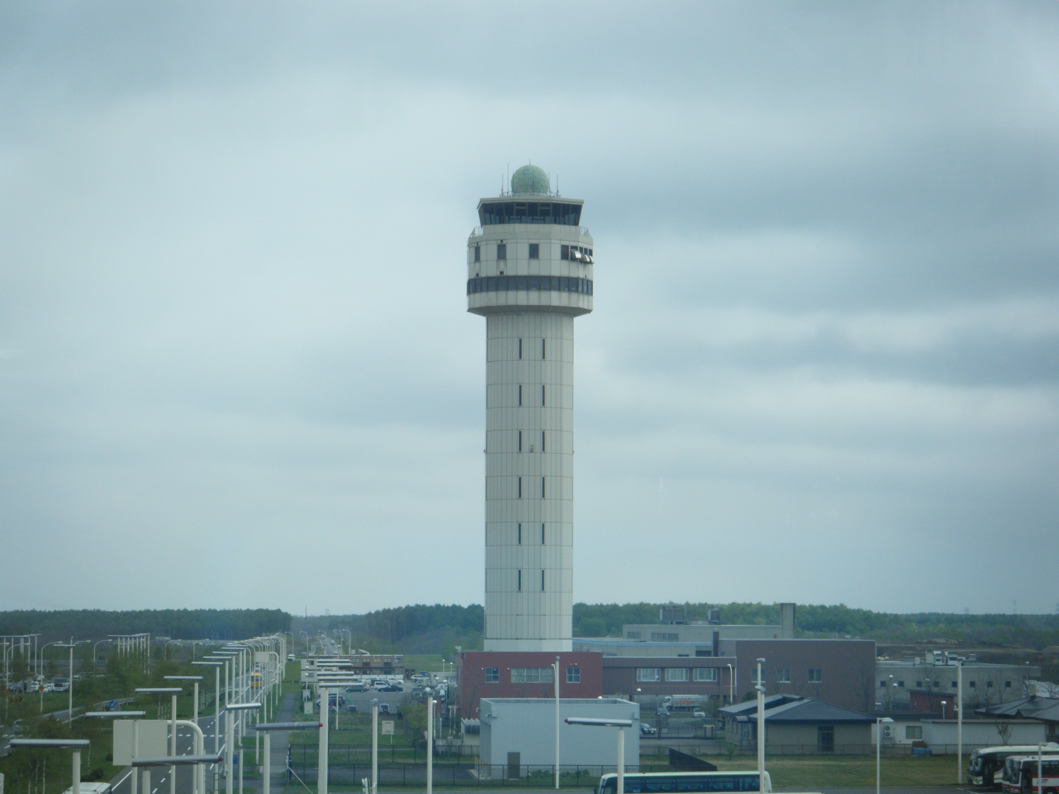 新千歳空港管制塔。国際線ターミナルビル内部から撮影。